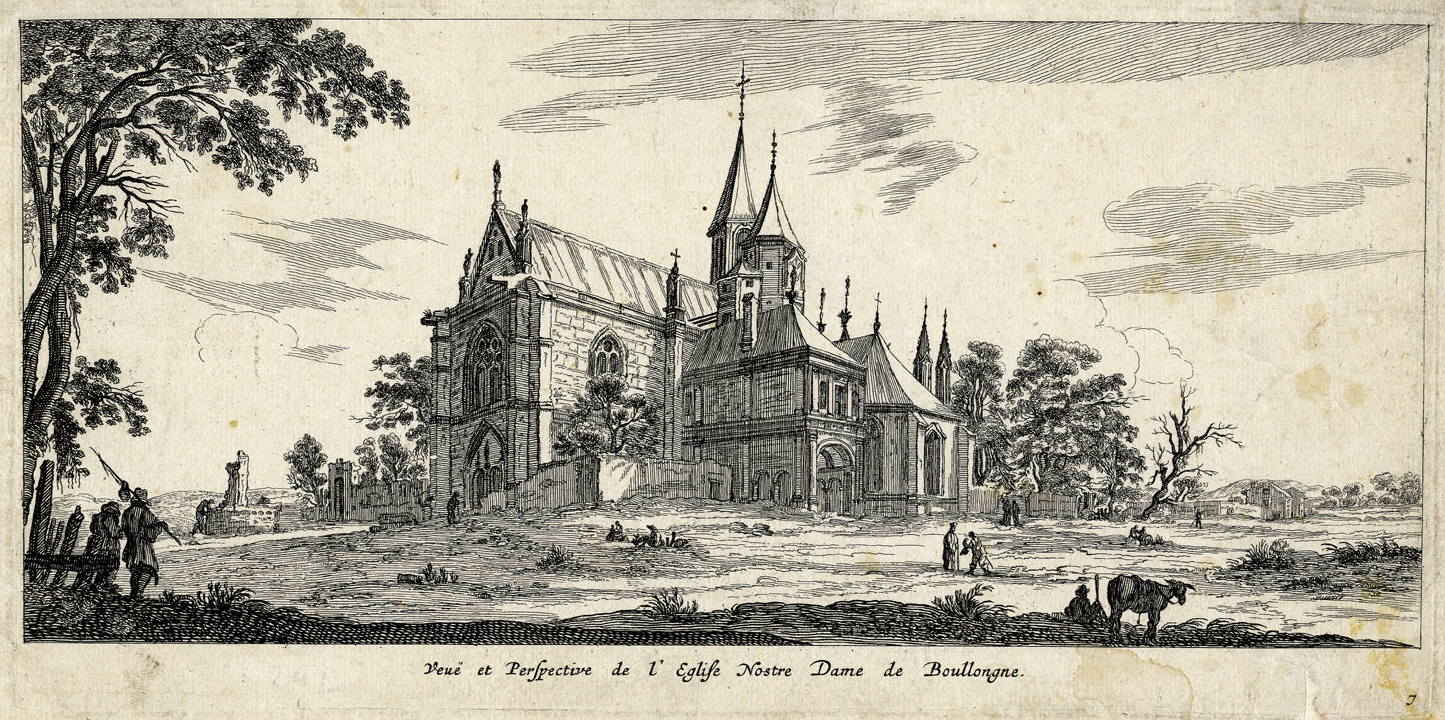 Veue et Perspective de l'Eglise Nostre Dame de Boullongne (Aus: Diverses Veues et Perspectives nouvelles de Rome, Paris et des autres lieux), Radierung